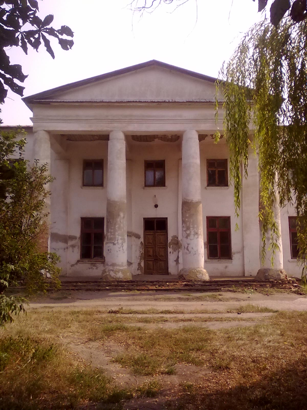 Один из двух сохранившихся флигелей дворцово-паркового комплекса архитектора Д .Кваренги в пос. Хотень Сумской области